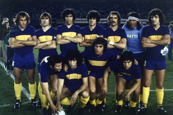 Boca Campeón de América y del mundo